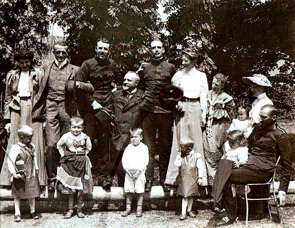 Maximilian Putz v. R., Eberhard Mayerhoffer v. V., Karl Putz v. R., Alfred v. Waldstätten, Alexander Wassilko v. S. mit Familien (von li.), 1906